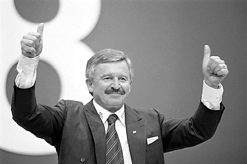 MdB Jürgen W. Möllemann auf dem Landesparteitag der FDP in Hagen